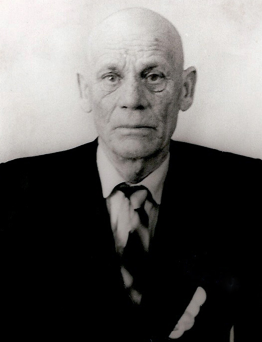 Вагин Василий Степанович (родился в 1901 году). Он участник гражданской и Великой Отечественной войн. Воевал на Юго-Западном фронте против белополяков в 1920 году, брал Киев, Бердичев, г. Белую Церковь. Был ранен, после излечения вернулся домой. С 1926 и до 1941 года работал учителем Новодевиченской школы. В самом начале Великой Отечественной войны ущел на фронт. Был под Москвой дважды ранен